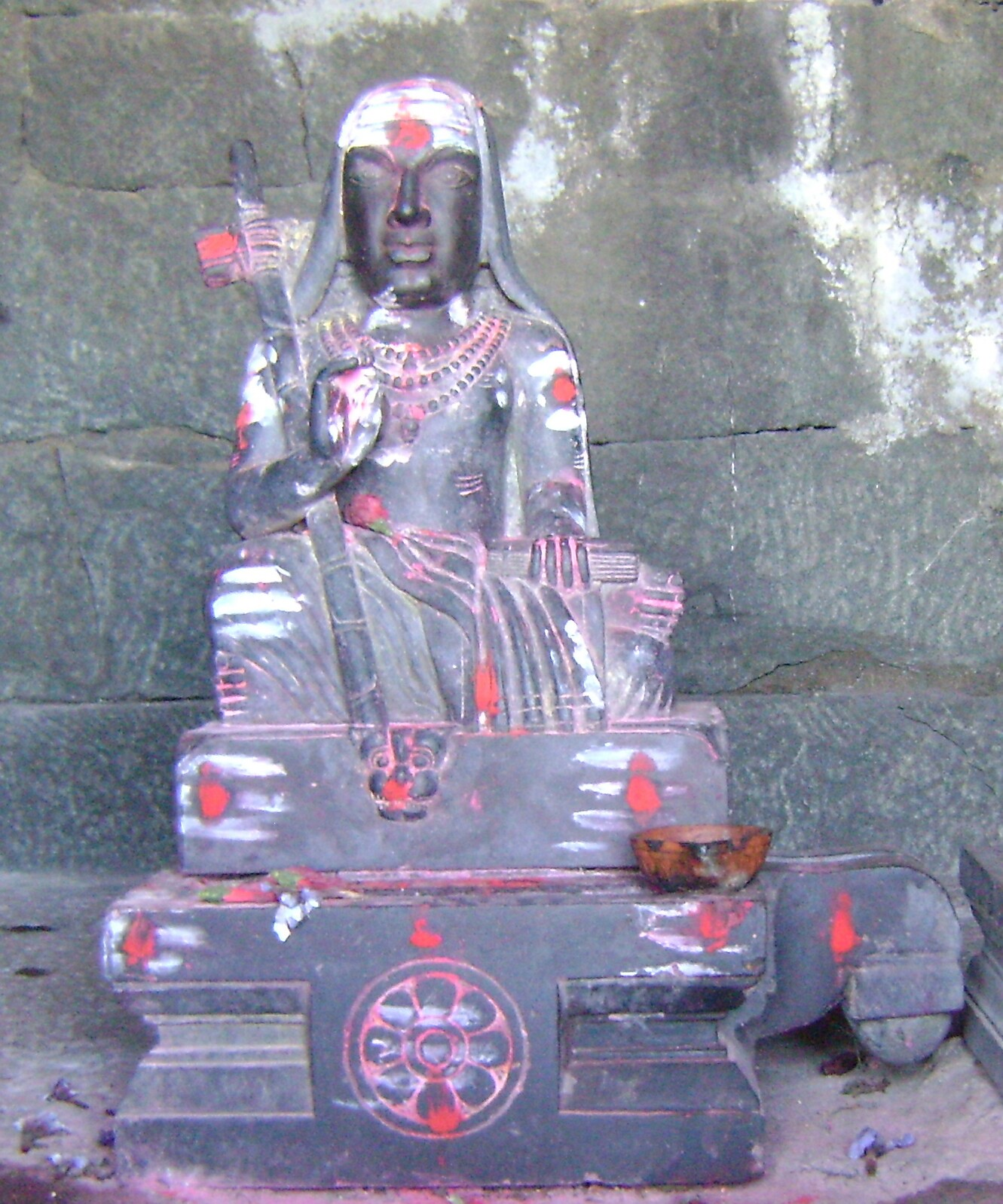 shankaracharya vigraha at Kutajadri Sarvajnapeet